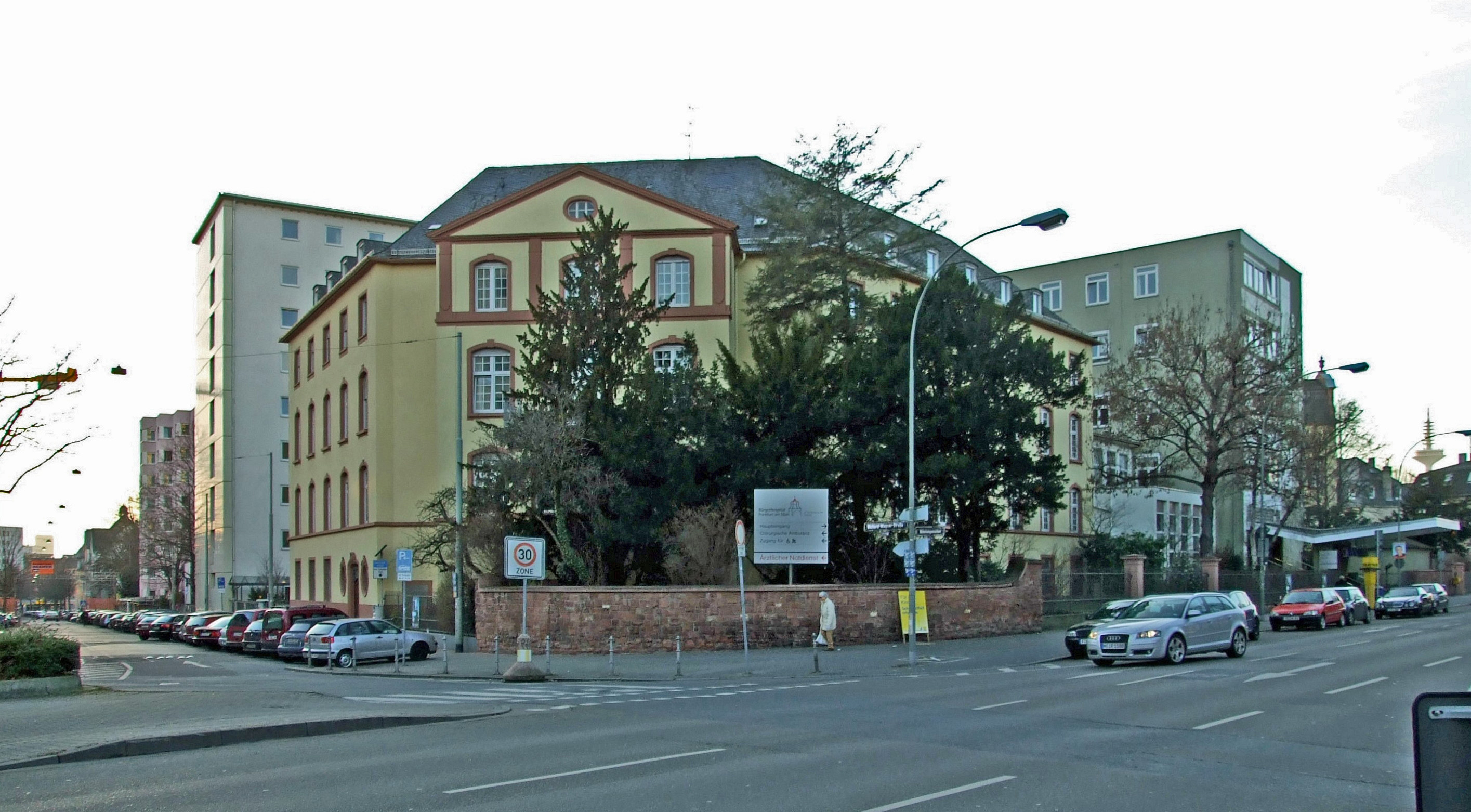 Buergerhospital in Ffm